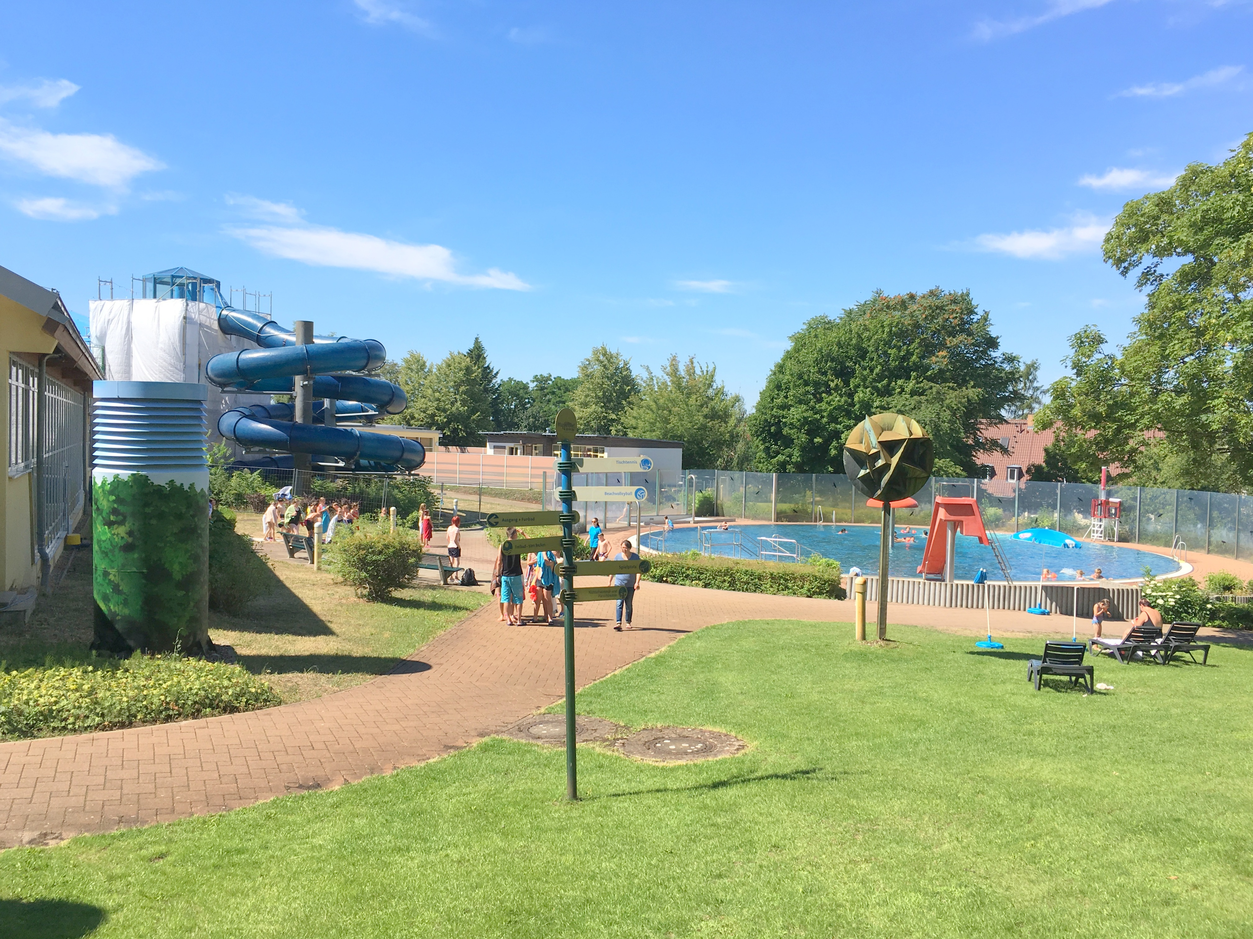 Marienbad Aussenanlage Freibad. im Hintergrund 80-Meter-Röhrenrutsche und Lehrschwimmbecken.